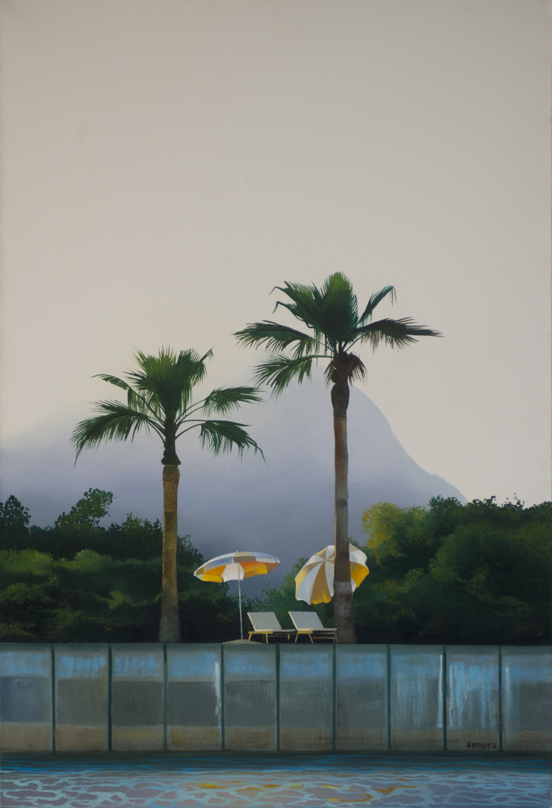 "Mousson en Corée" 65x46 cm